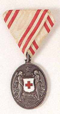 Osztrák Vöröskereszt Díszjelvényének Ezüstzérme